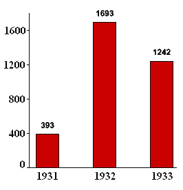 Любомир Таушанов, 2005 г.